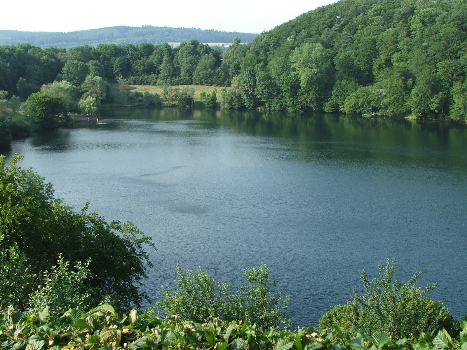 Beschreibung: Ulmener Maar, von der Burg betrachtet. Quelle: selbst fotografiert Fotograf: D. Steffes Datum der Aufnahme: 16.07.2005